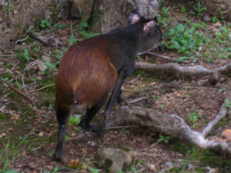 Dasyprocta leporina, de son nom vernaculaire 'Agouti' souvent confondu avec le Paca qui a comme appelation scientifique 'Agouti paca' - Photo prise aux êles du Salut (Guyane) - 2005